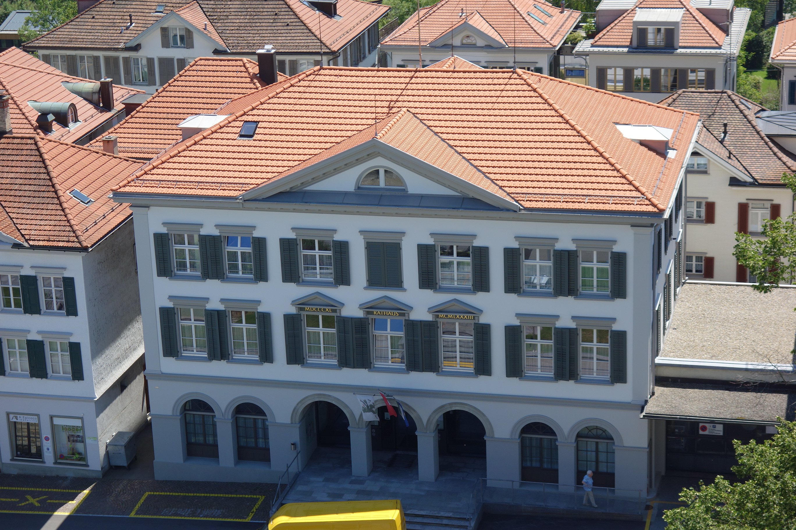 Rathaus Heiden AR, Schweiz